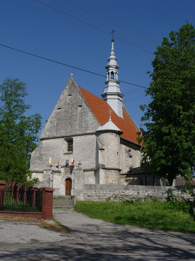 Dobrowoda, gm.Busko-Zdrój, Kościół